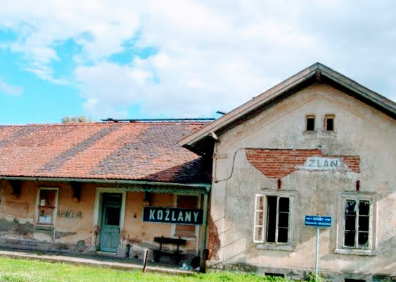 Nádraží Kožlany